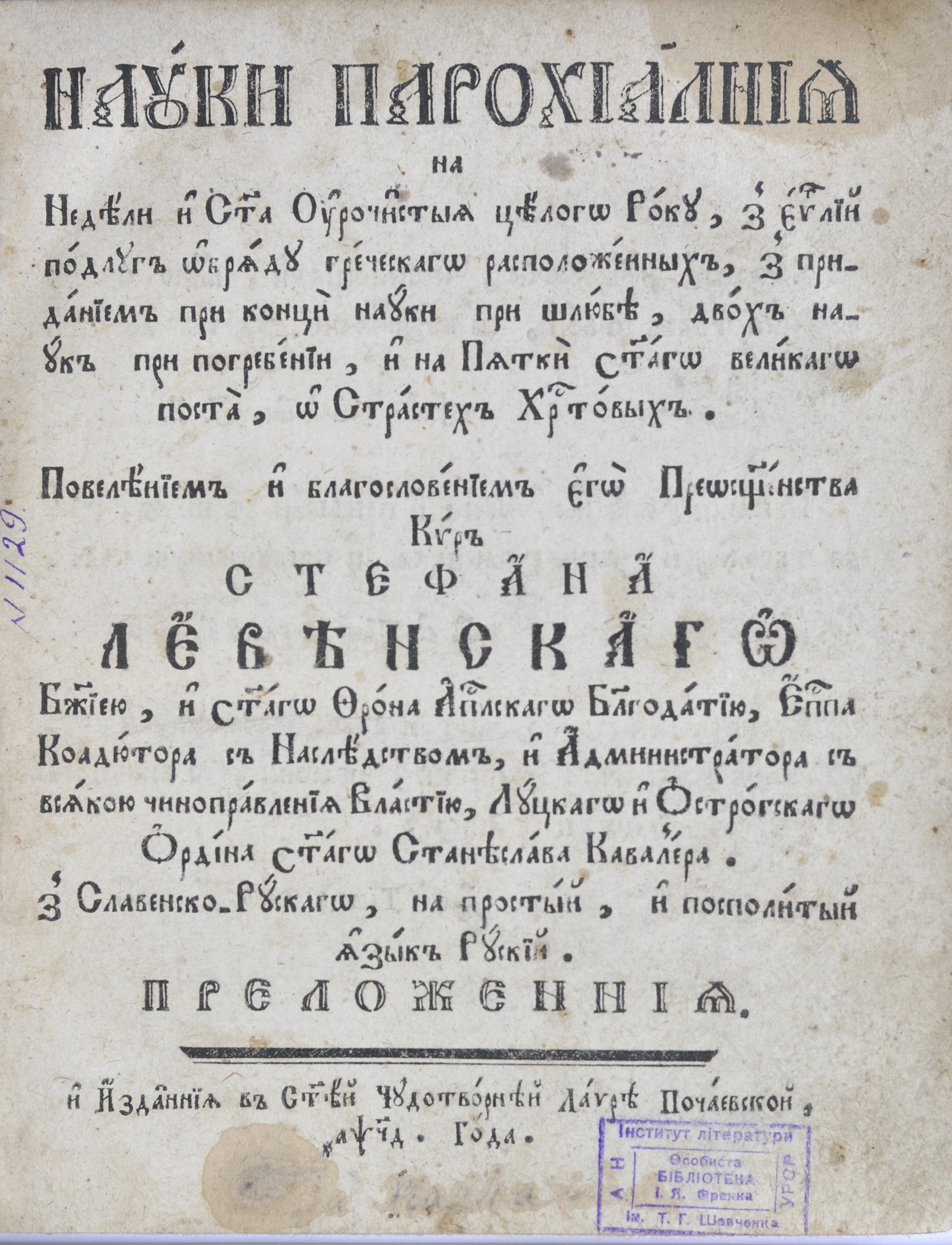 Юліян Добриловський. Hаукі парохіальні. Почаїв, [1794]. Титульний аркуш. З особистої бібліотеки І.Франка